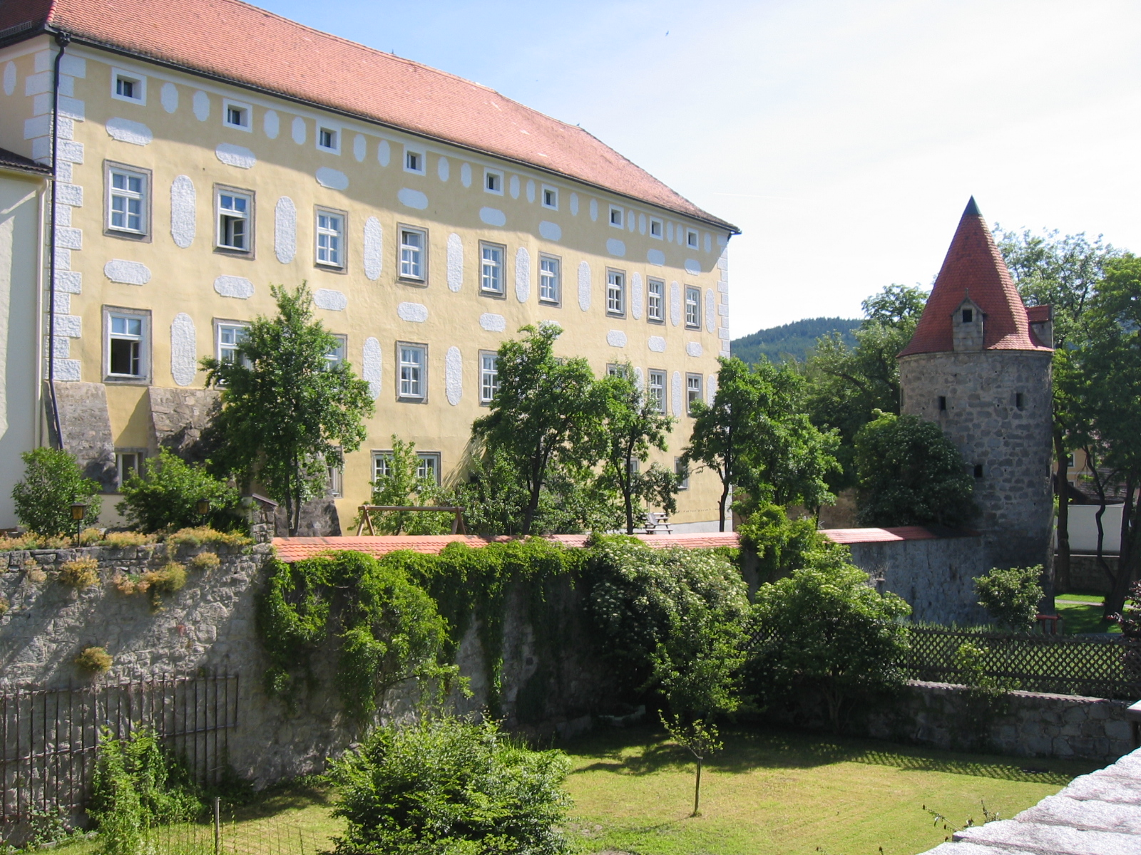 Dechanthof, jetzt ist dies der Pfarrhof